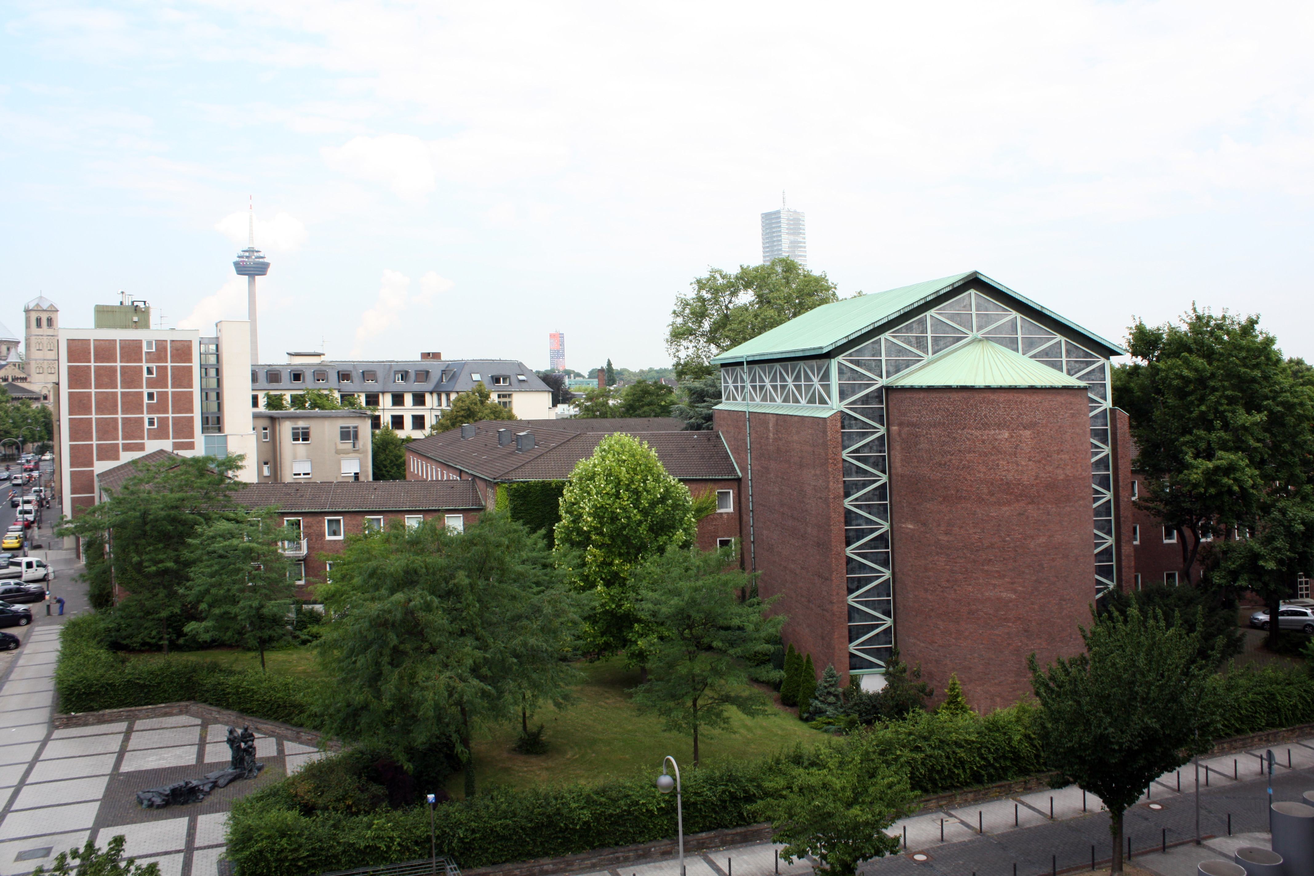 Seminarkirche des Priesterseminares des Erzbischöflichen Palais' Köln.